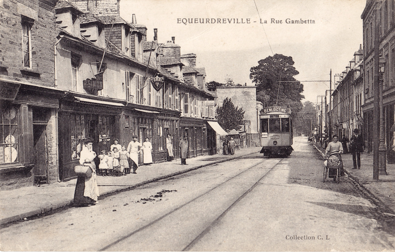 Carte postale ancienne éditée par C. L. : ÉQUEURDREVILLE - La rue Gambetta